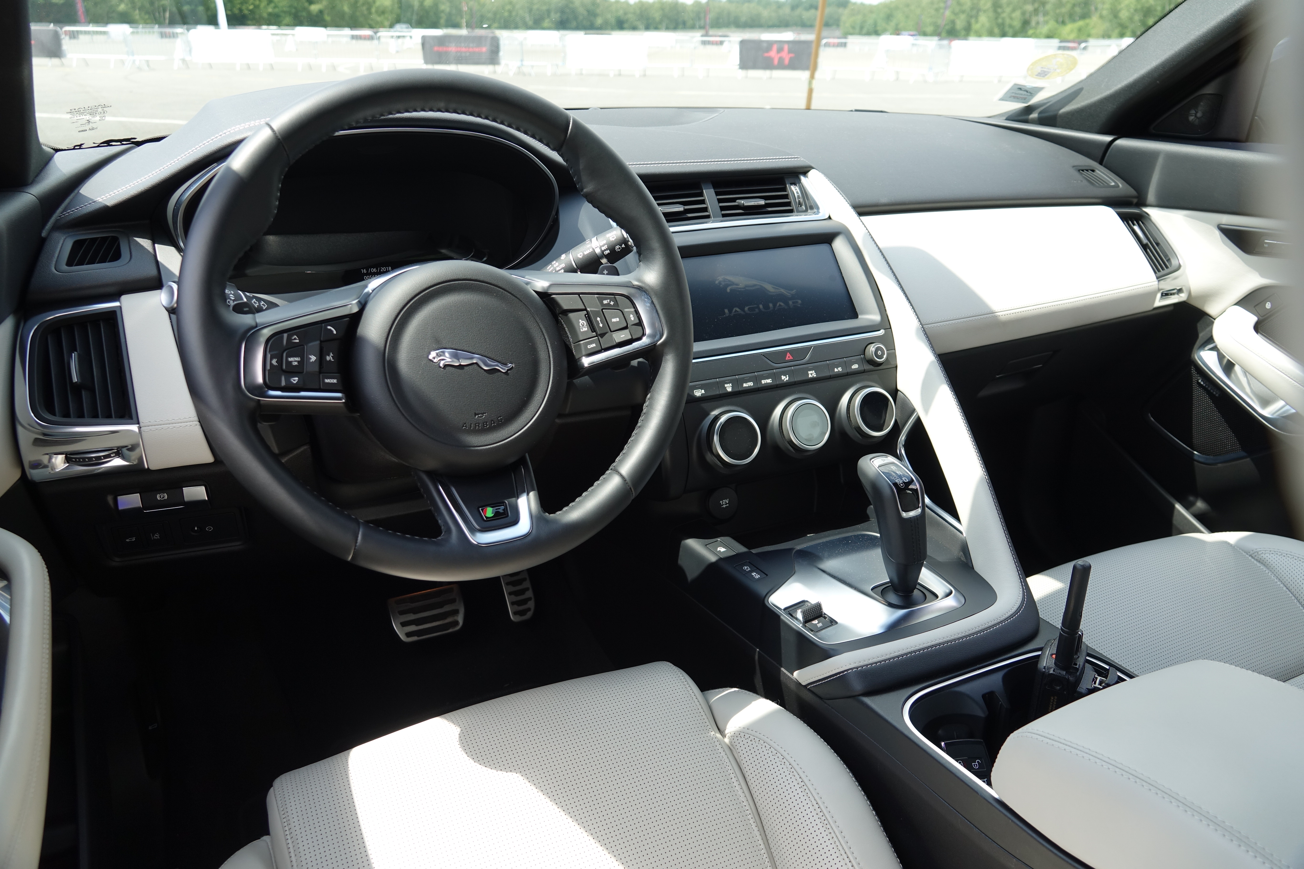 Essais Jaguar E-Pace